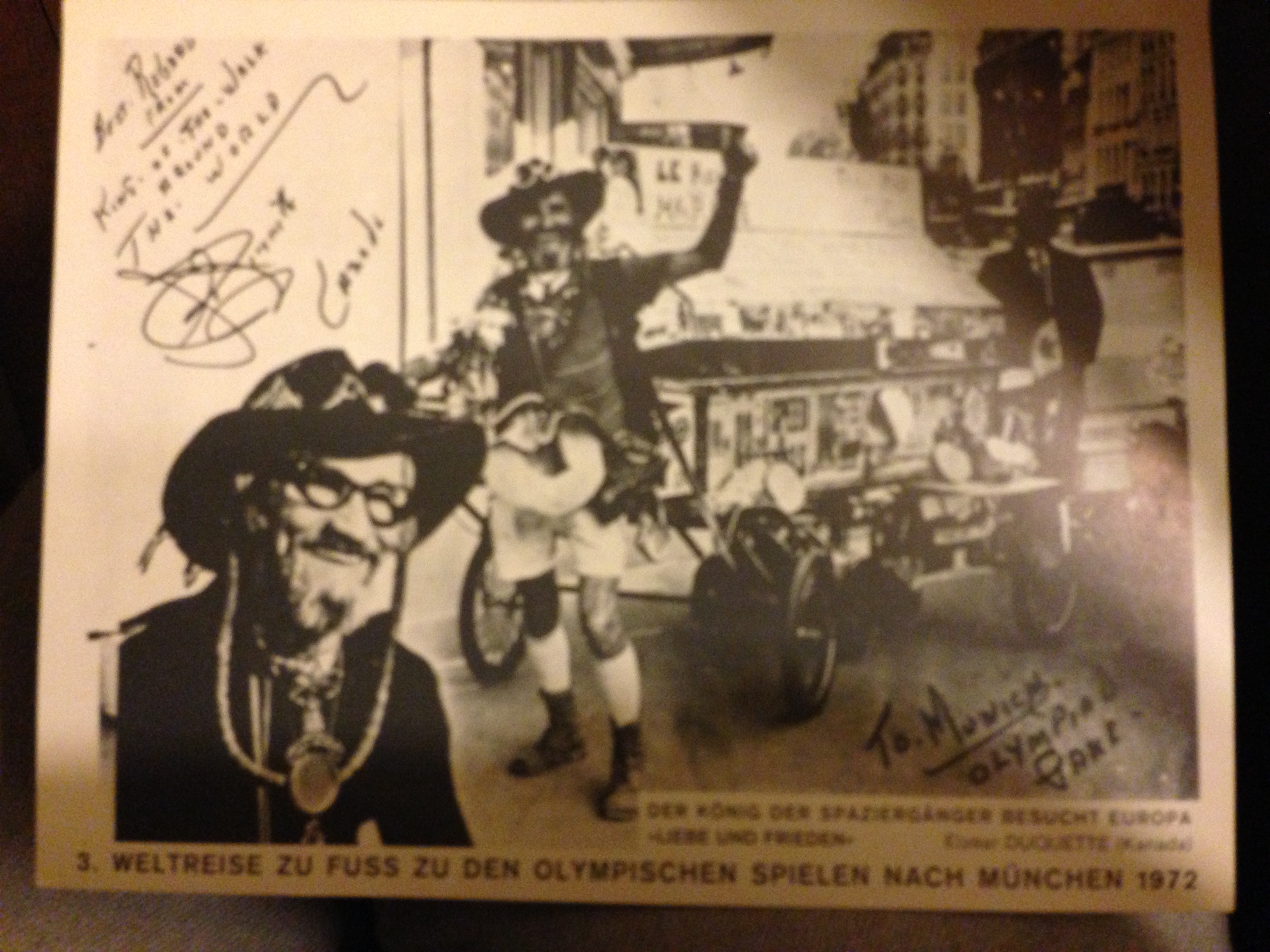 Elzéar Duquette